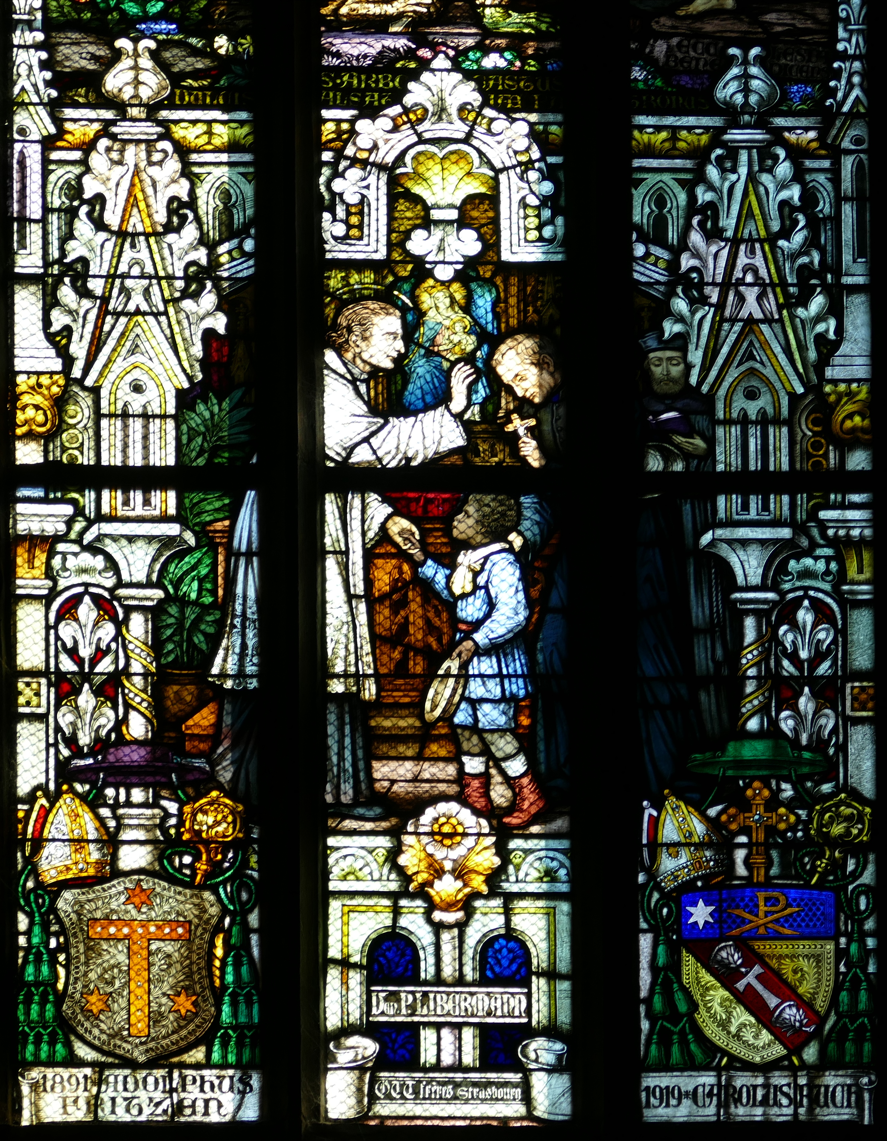 Alsace, Bas-Rhin, Saverne, Église Notre-Dame-de-la-Nativité (PA00084954, IA00055464). Verrière à personnages du chœur (Ott Frères, 1925): Père Libermann. Les blasons des évêques de Strasbourg: Adolphe Fritzen (gauche), Charles Joseph Eugène Ruch (droite).